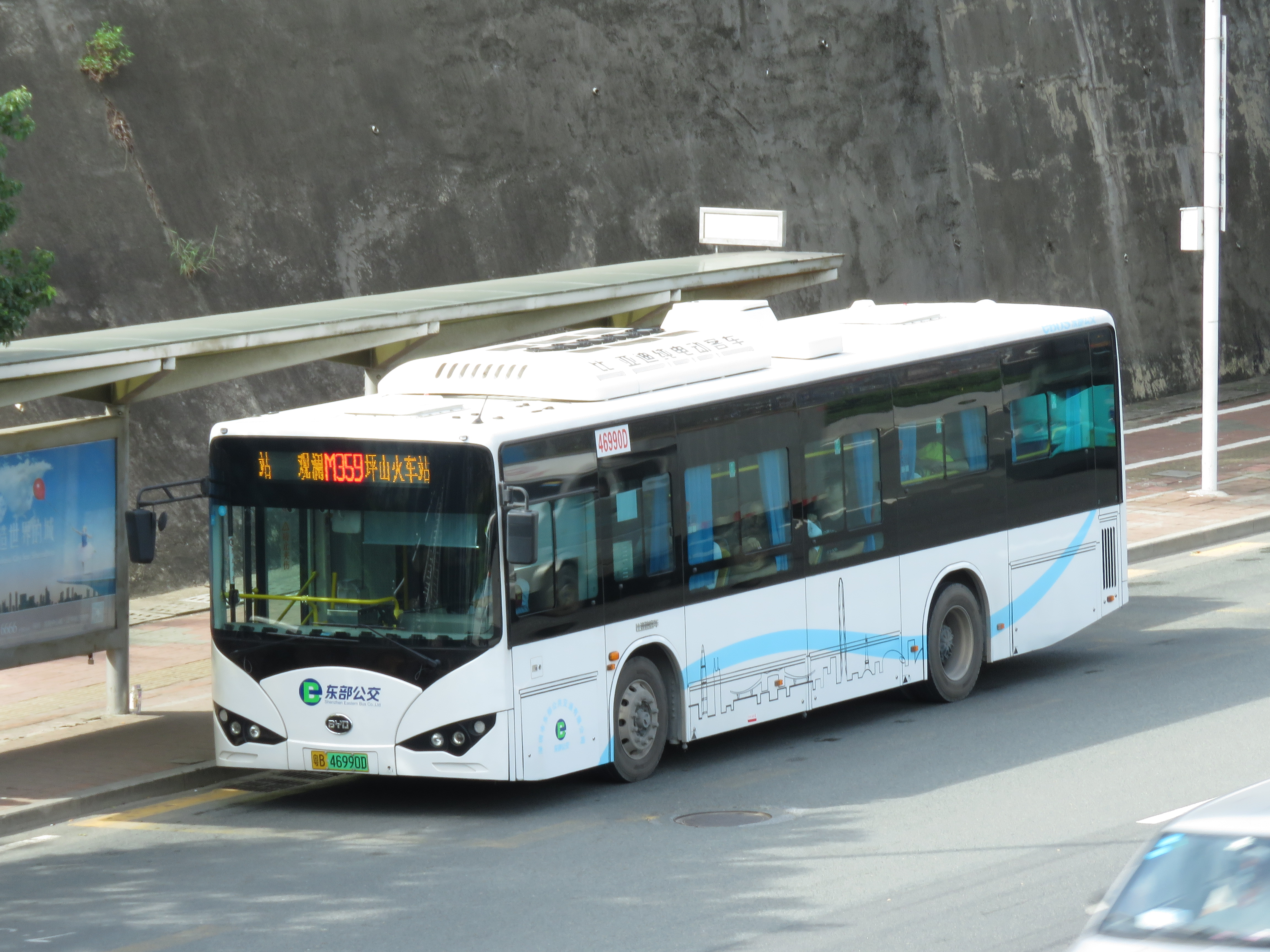 深圳公交 东部公交 46990D M359路